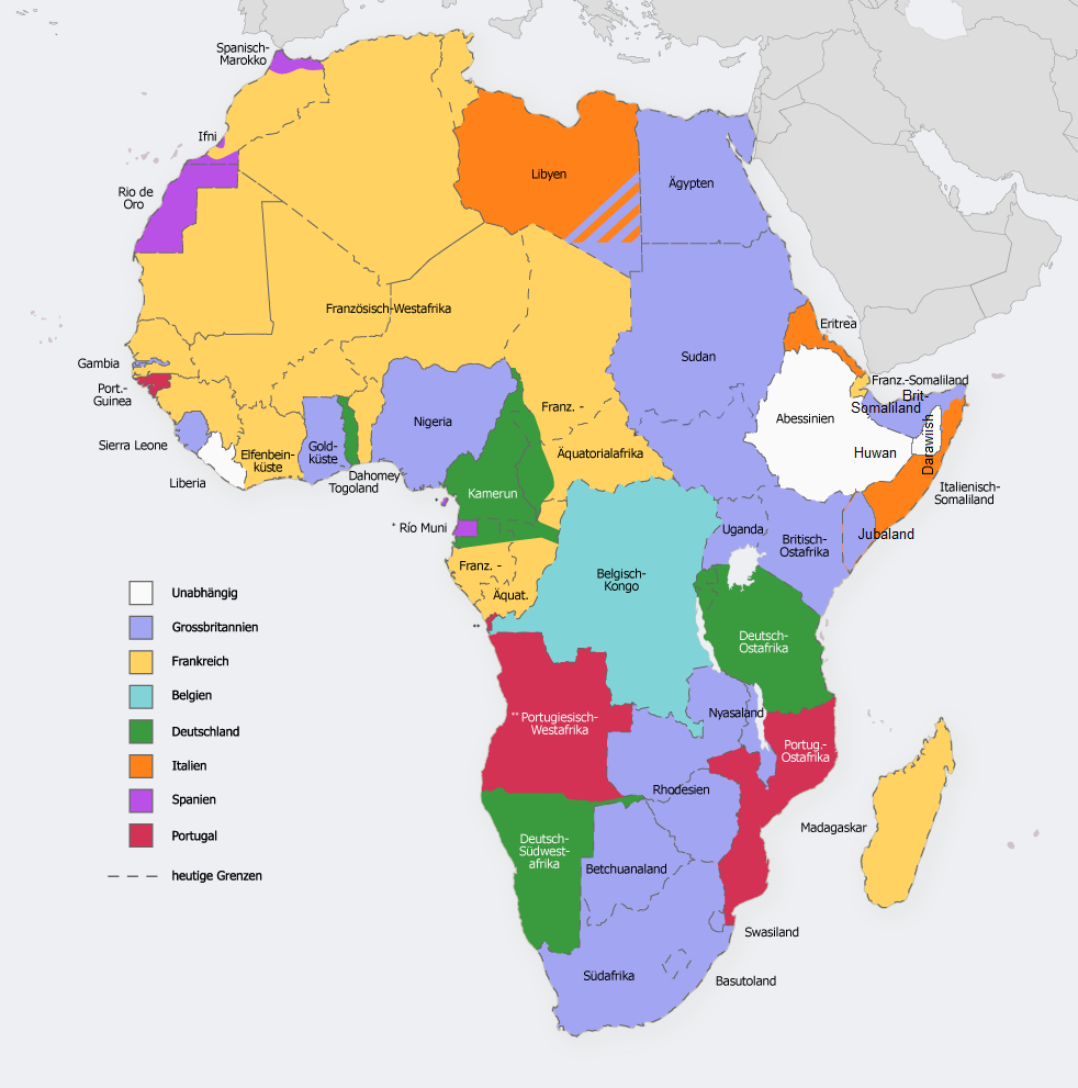 Eventuelle Fehler bitte hier melden. Karte von Afrika um 1913. Basiert auf :en:Image:ColonialAfrica.png - Bild:Kolonisation Afrikas.png. Alternative Version: Afrika Kolonisation Beige selbstgezeichnet von Perconte, Lizenz